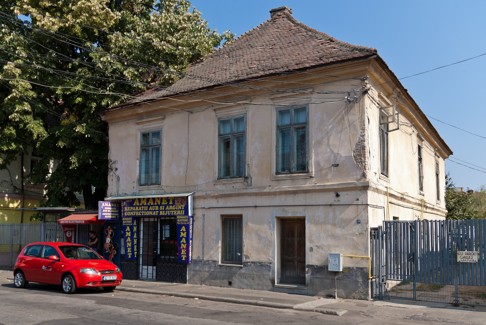 Fotografia prezinta casa de pe str. Victoriei nr. 36, vazuta dinspre S.